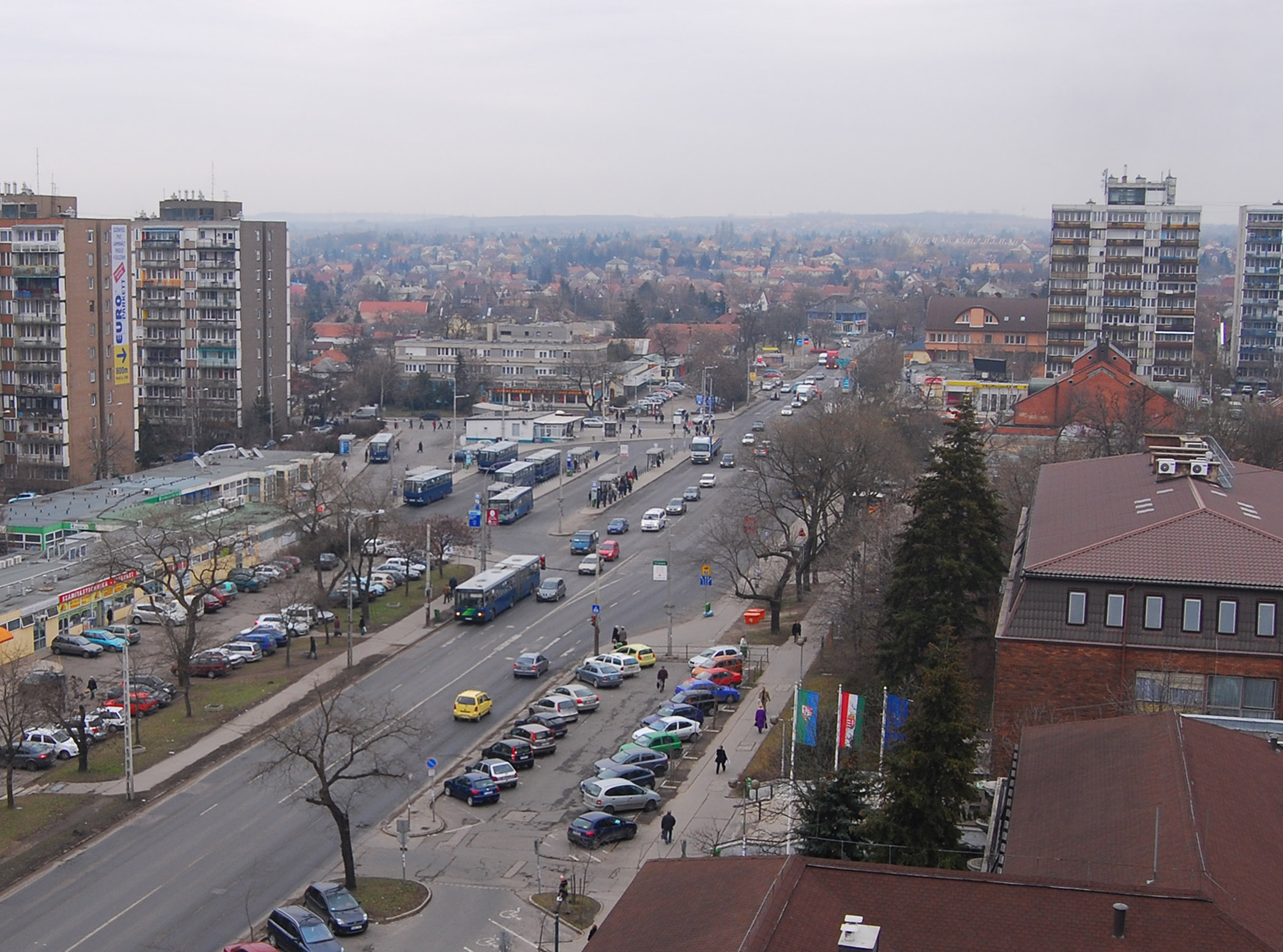 The Elág at Rákoskeresztúr, Budapest, Budapest XVII. kerülete